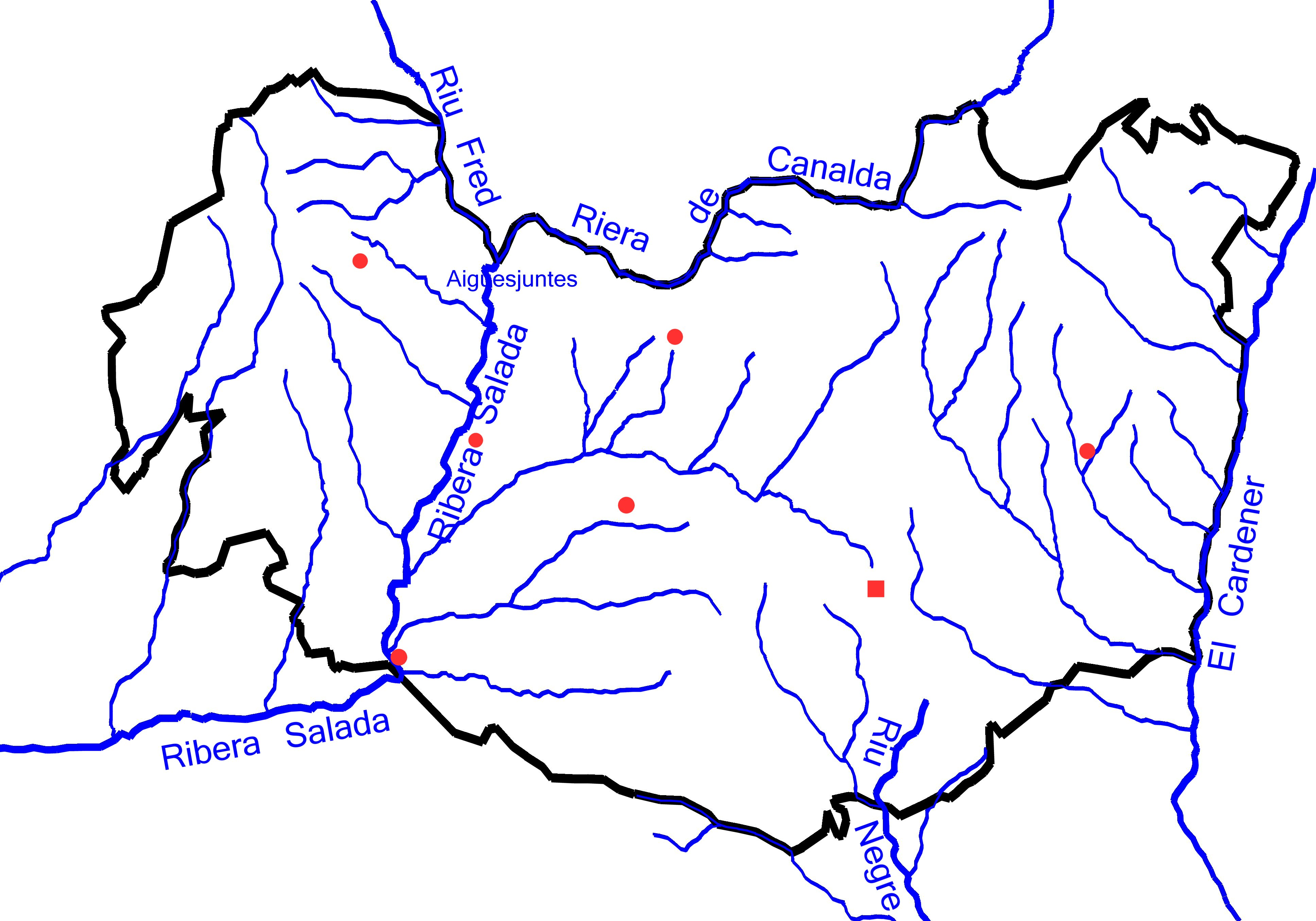 Mapa hidrogràfic de Lladurs (Solsonès)